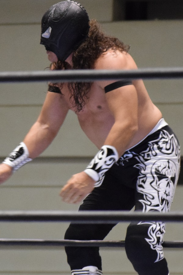 2017年1月13日 大阪府立体育会館・第二競技場「CMLL FANTASTICA MANIA 2017」 エウフォリア